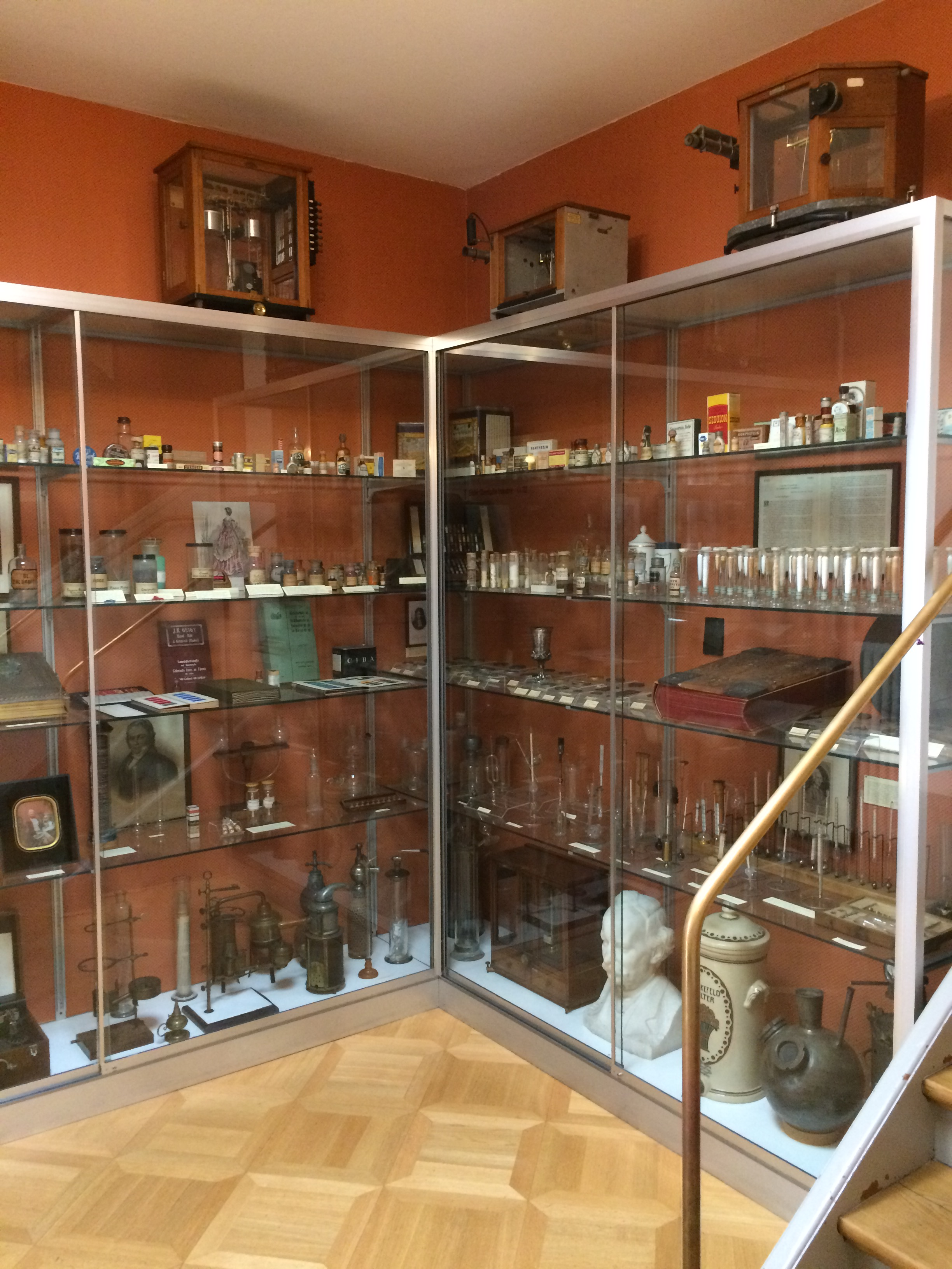 Industriegeschichte